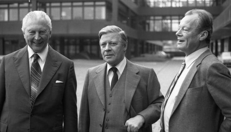 Pflanzung von Kanzler-Gedächtnisbäumen im Park des Palais Schaumburg durch Bundeskanzler Helmut Schmidt [mitte] und seine Vorgänger Willy Brandt [rechts] und Kurt-Georg Kiesinger [links]